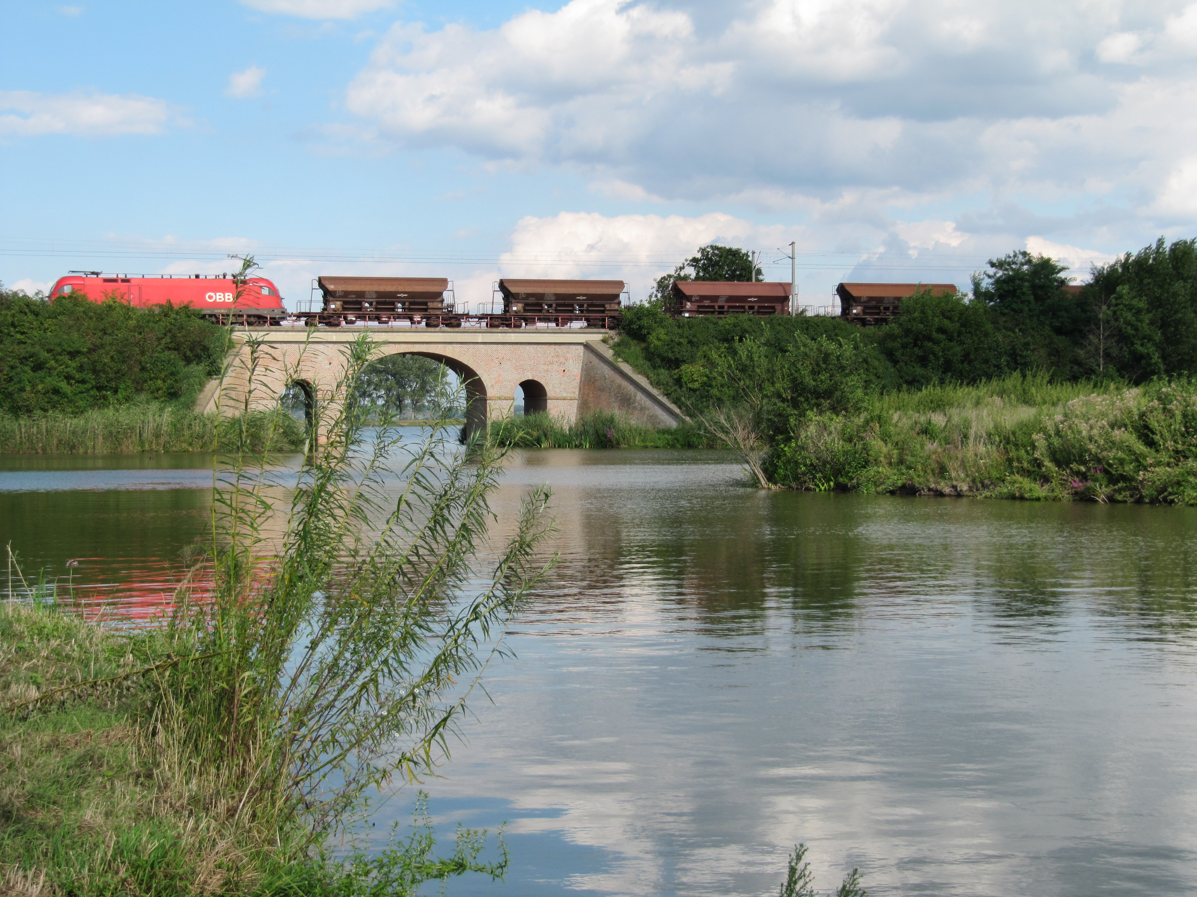 Bernhardsthaler See/Teich mit Nordbahnviadukt